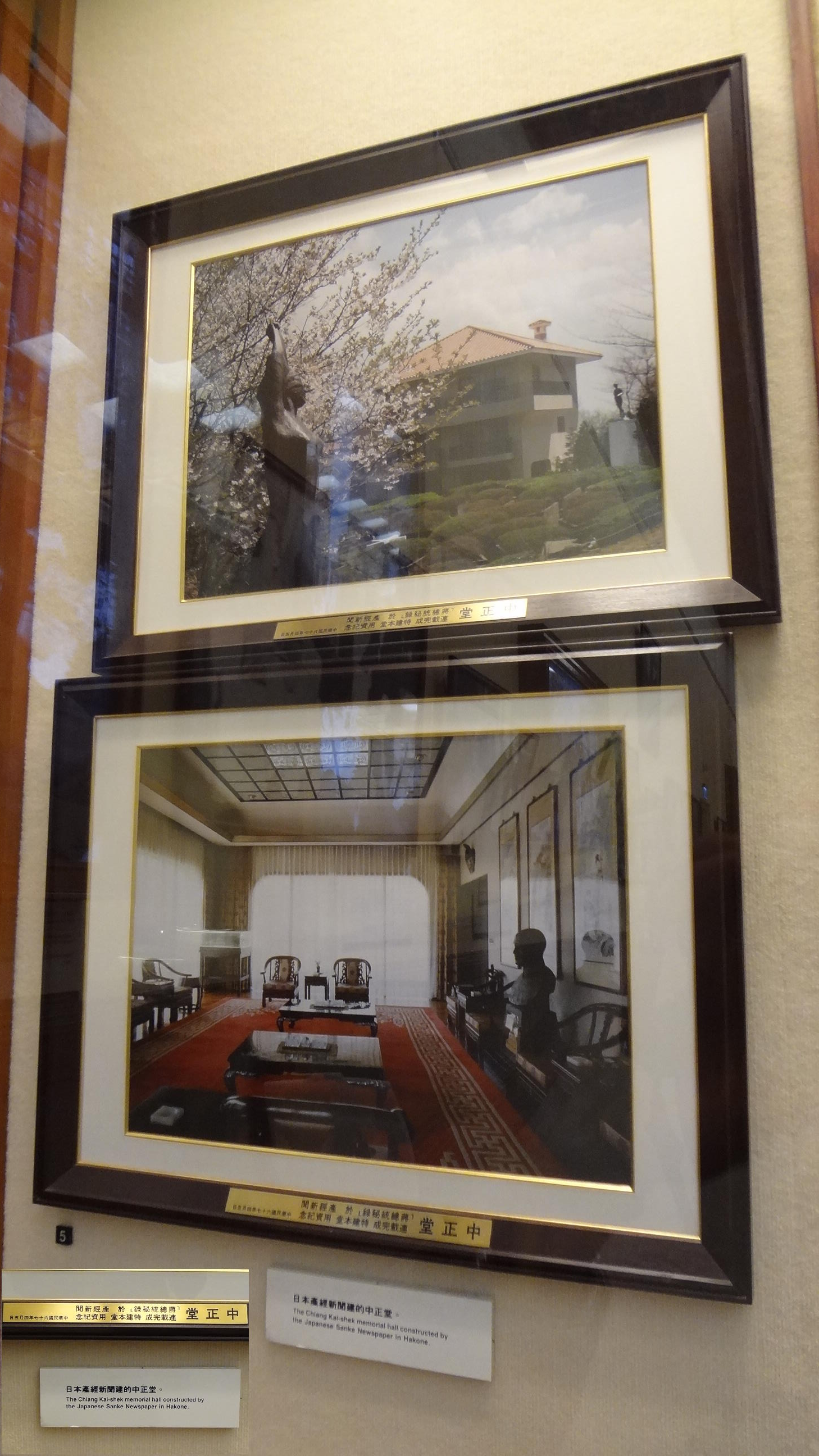 國立中正紀念堂展示的日本箱根中正堂照片，於1978年由產經新聞社社長鹿內信隆贈送。